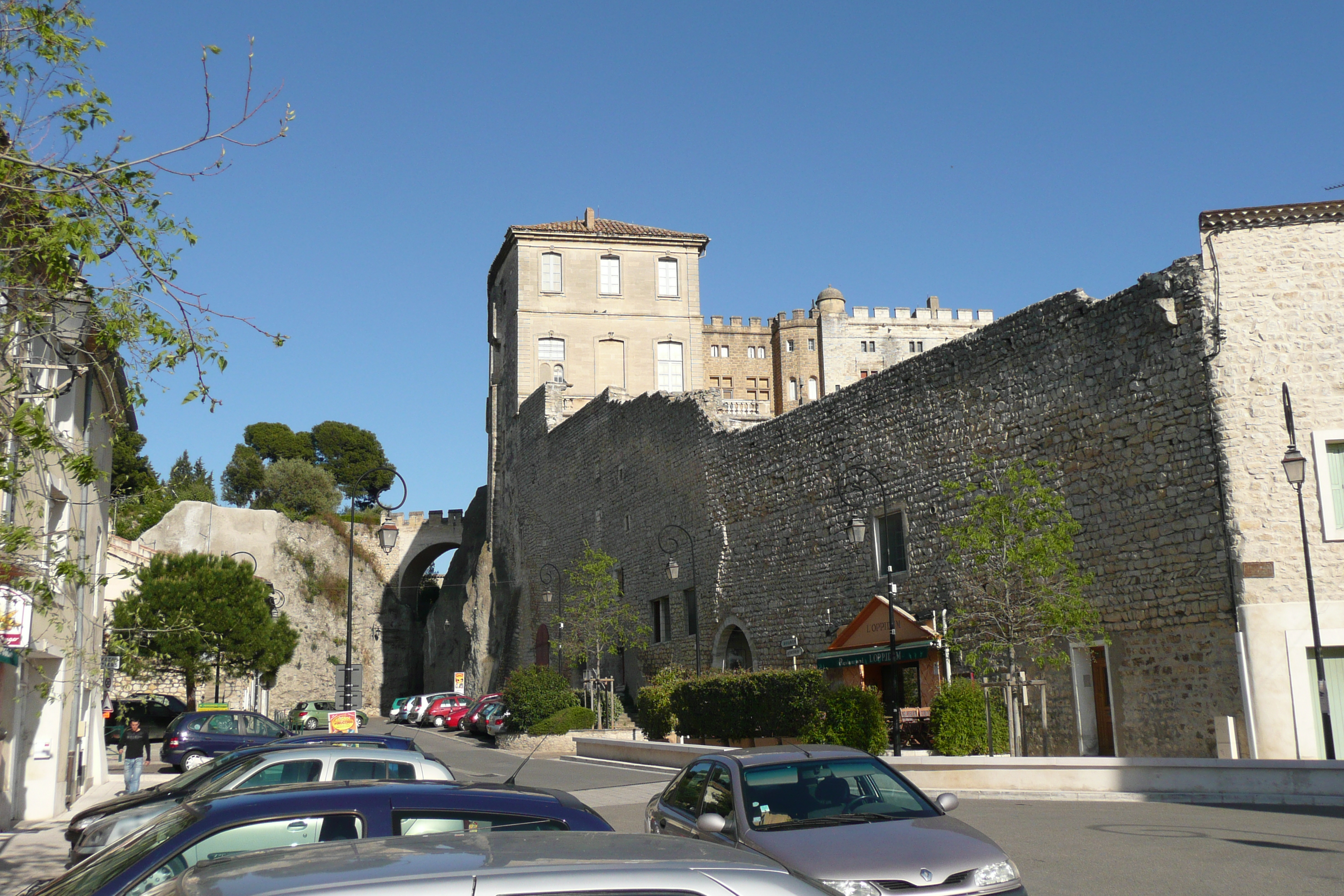 Aramon.